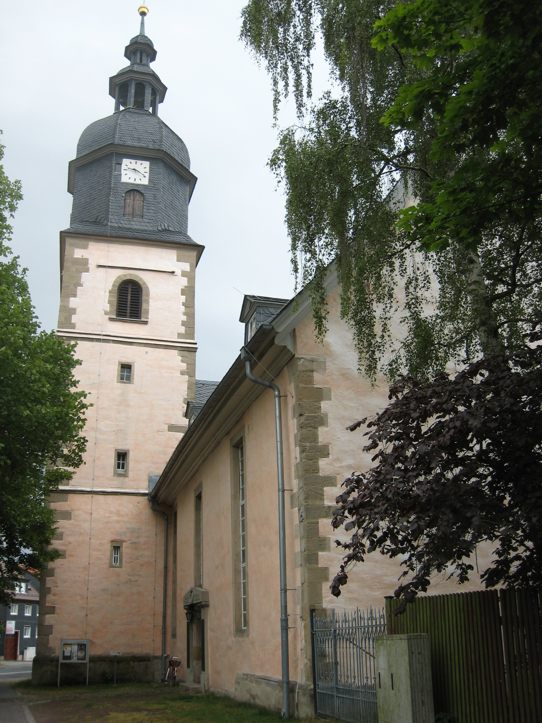 Liebfrauenkirche Langewiesen 2